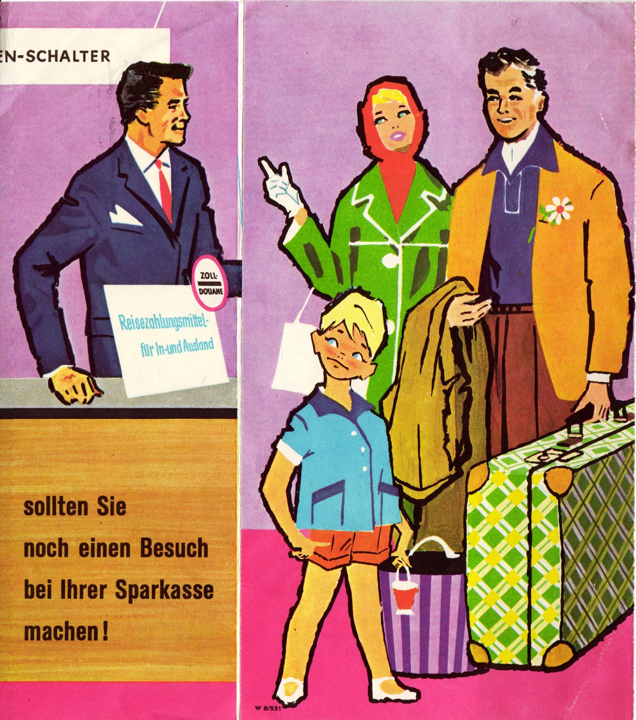 Prospekt/ Brochure von Heinz Traimer (Wien) entworfen. An einem Bankschalter holt sich eine Familie vor der Urlaubsreise Fremdwährungen ab.